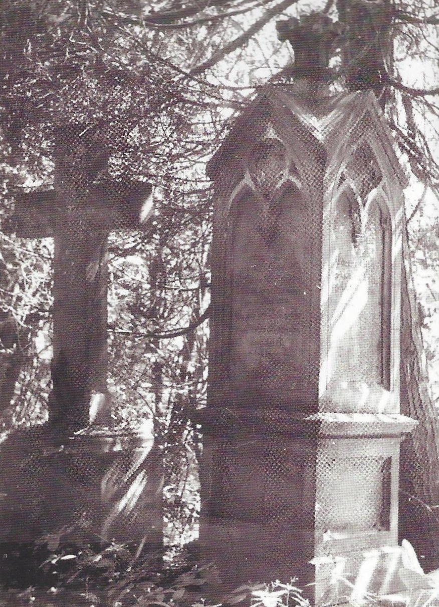 Grabmal des Geestemünder Pastors Georg Plaß am originalen Standort auf dem Geestemünder Friedhof